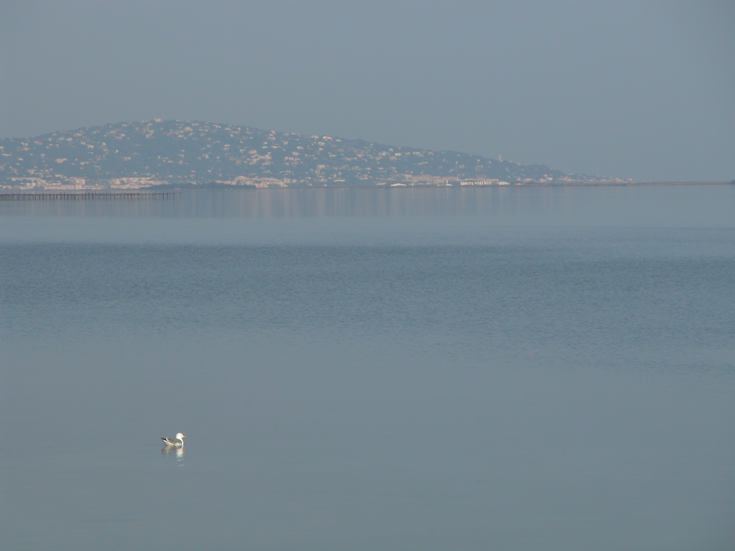 Vue sur l'Étang de Thau depuis Marseillan - Photo personnelle.